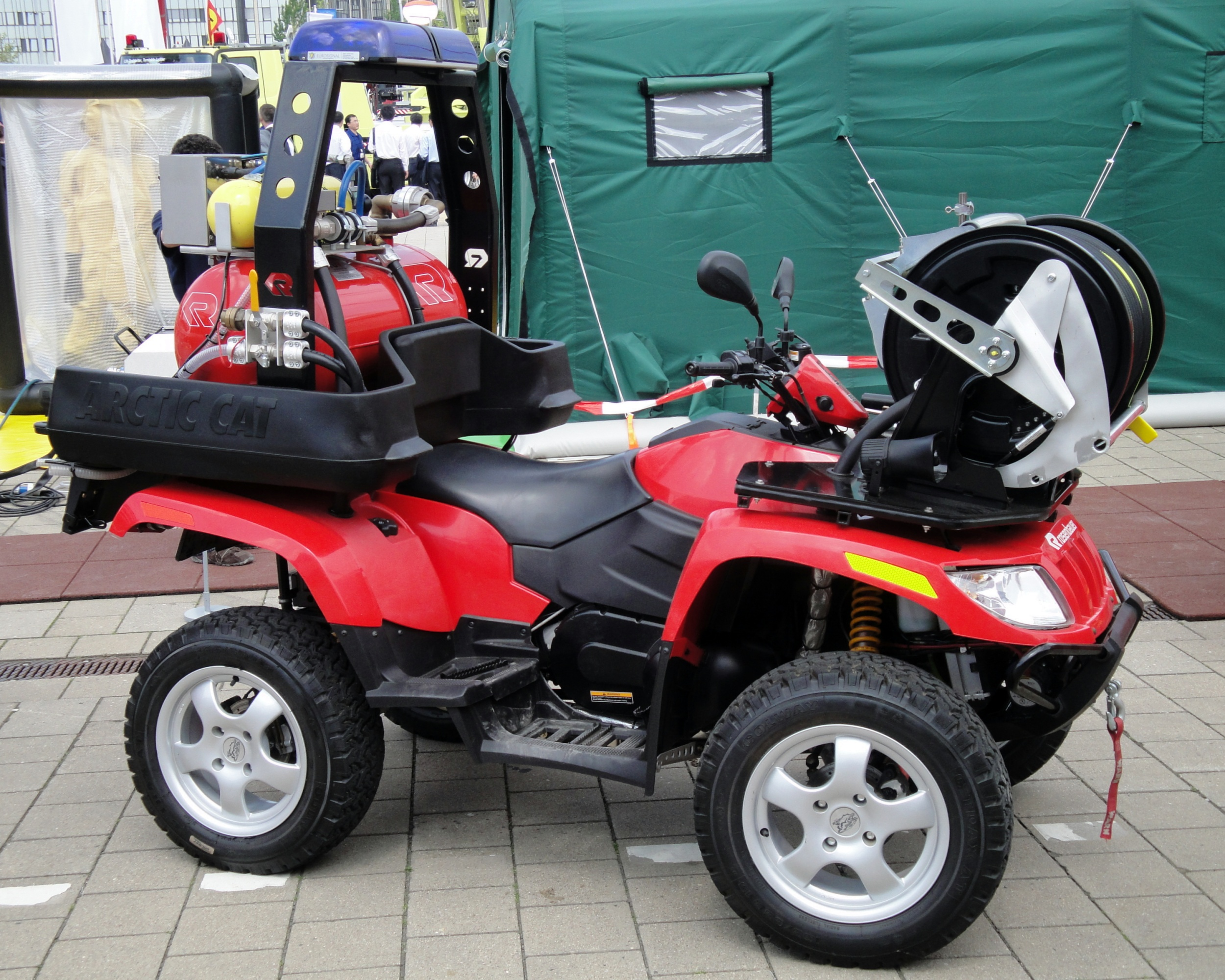 Arctic Cat 500 4x4 mit POLY CAFS von Rosenbauer, Interschutz 2010